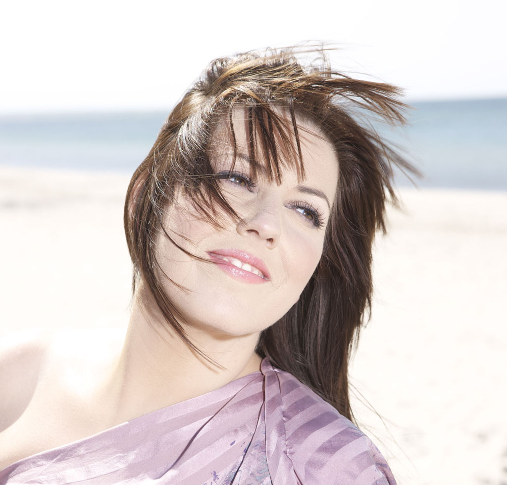 Linda Andrews, Faroese/Danish gospel singer